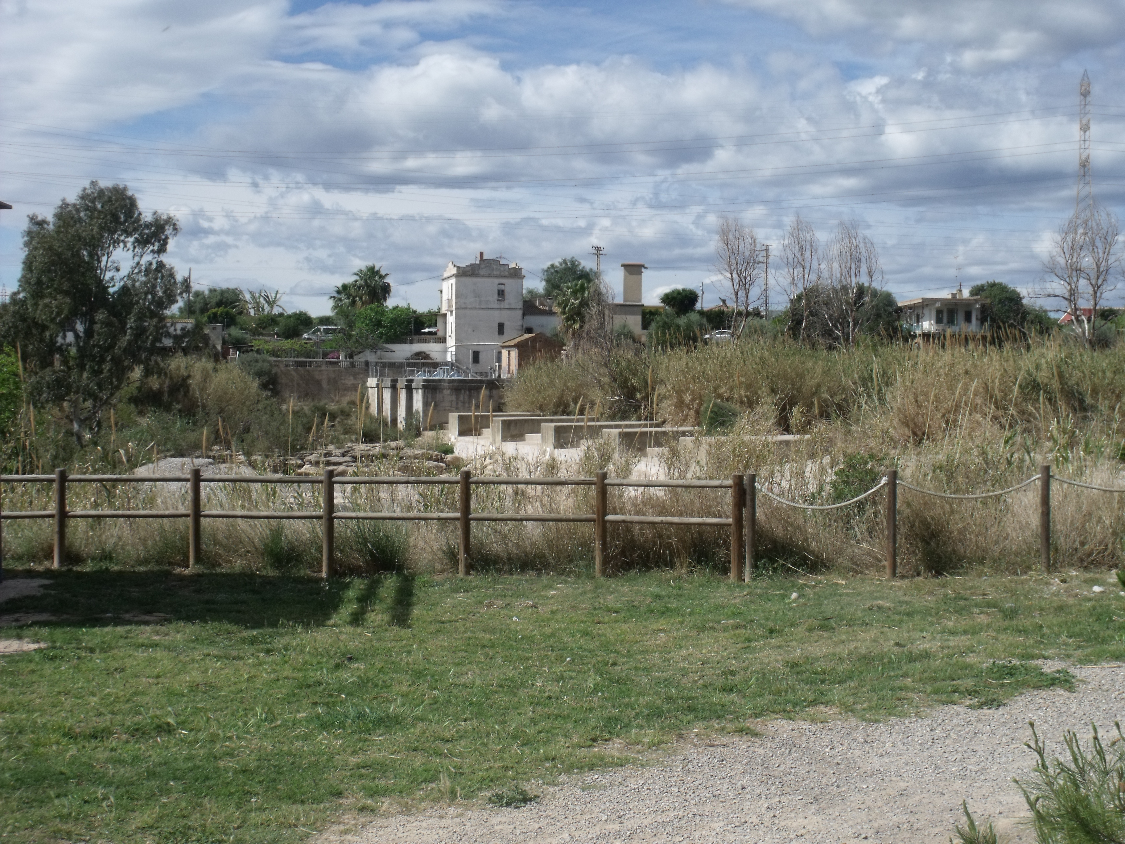 Azud de Burriana, Los Reballadores.